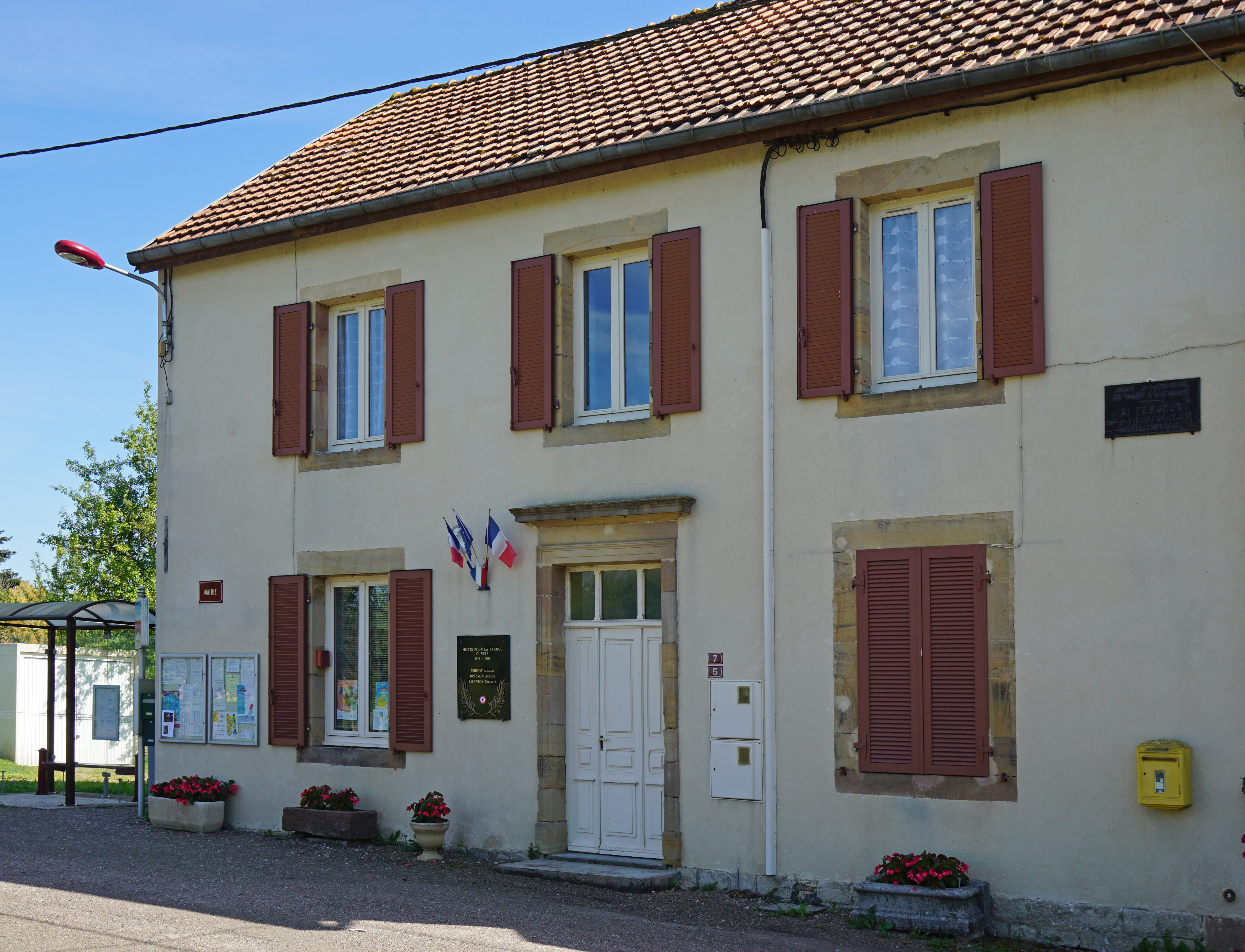 Mairie de Saint-Ferjeux.